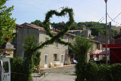 auteur : Elise Amiel